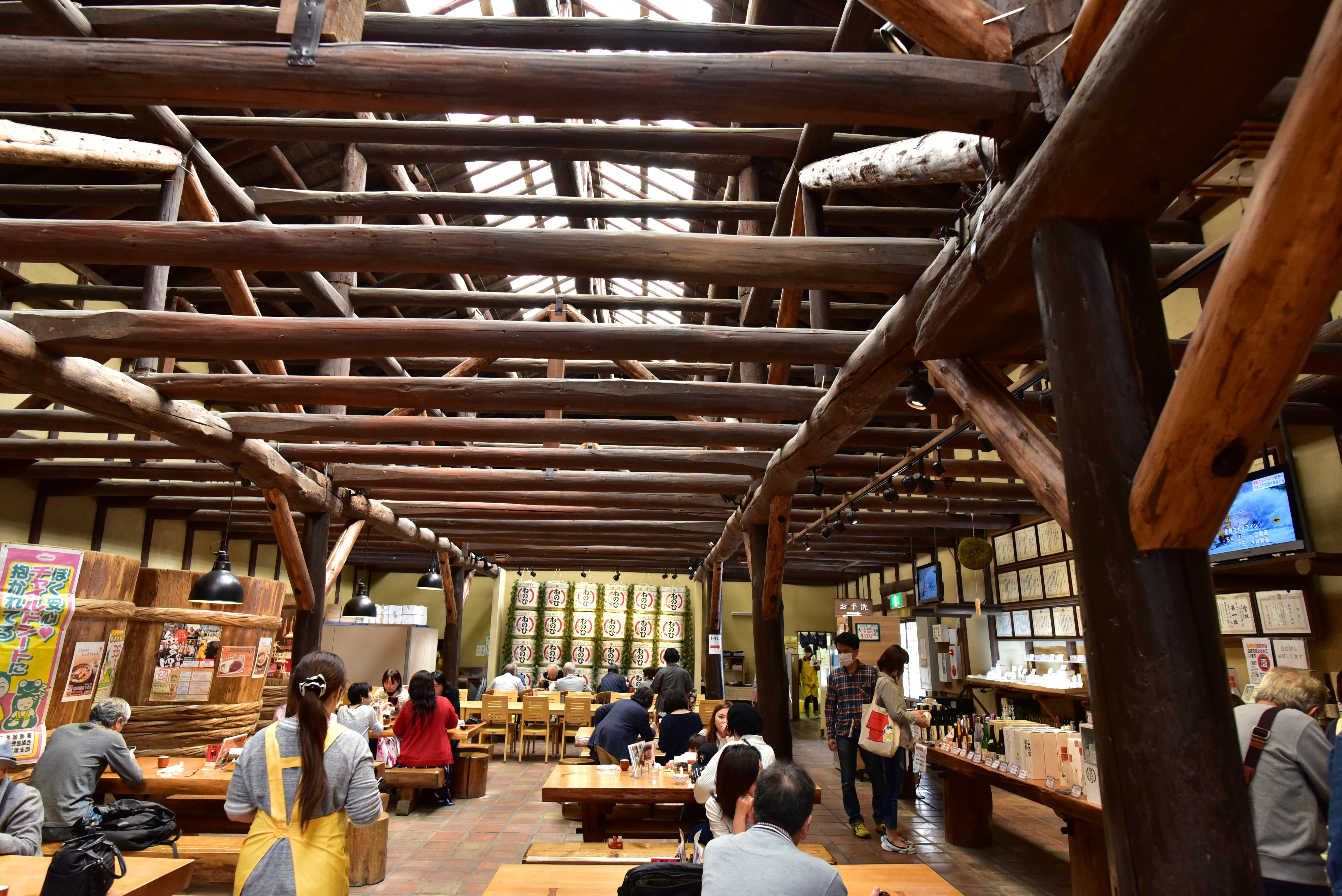 盛田味の館(店内）